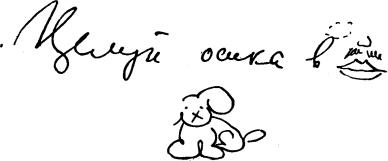 Рисунок Маяковского в письме, адресованном Лиле Брик и подписанном "Твой Счен" (Щен).